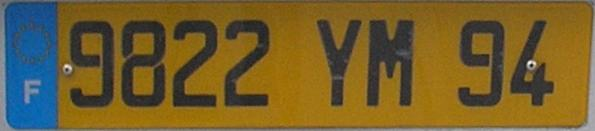 Номерний знак